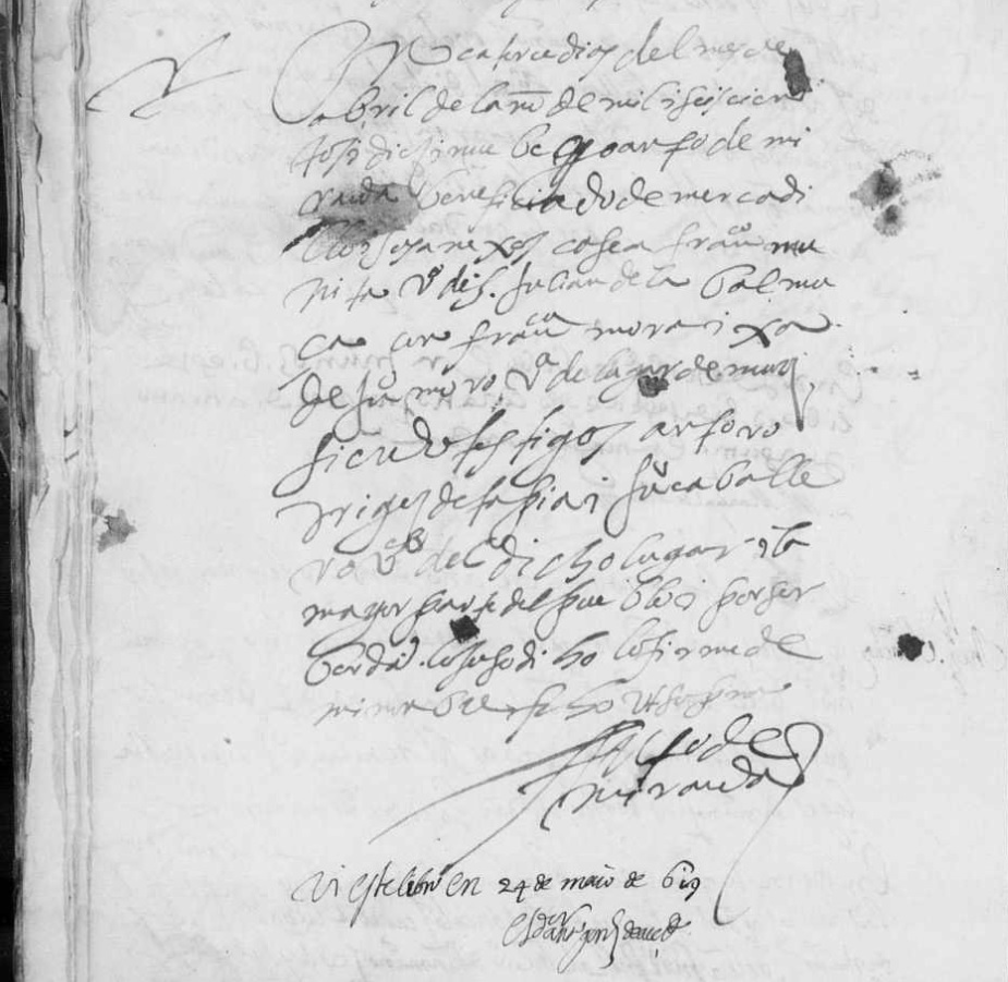 Acta matrimonial fechada en 1619 en la pedanía de Mercadillo, del municipio de Muñoz